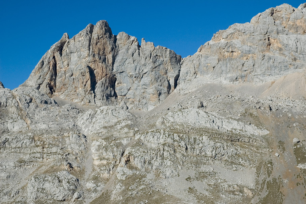 Montañés: Jorcaos Rojos. Picos d'Europa. Macizu de los Urrieles.